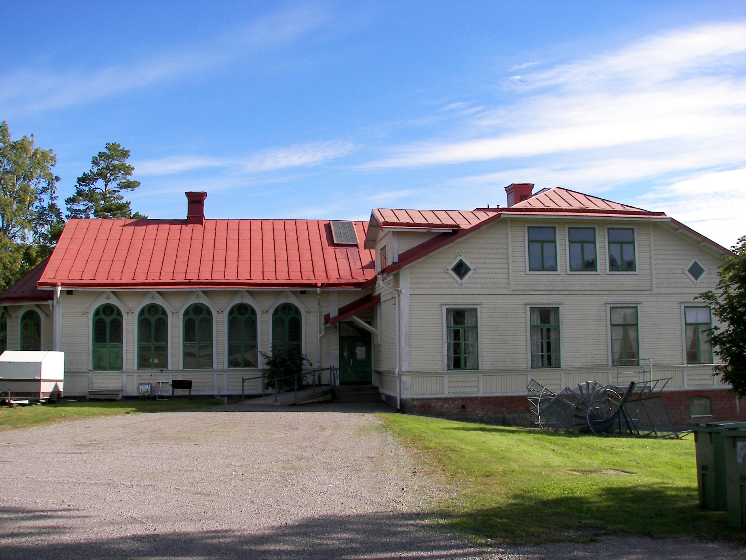 Kubikenborgs skola sett från gårdsplanen. Arkitekt Knut G Gyllencreutz, byggår 1898-1899